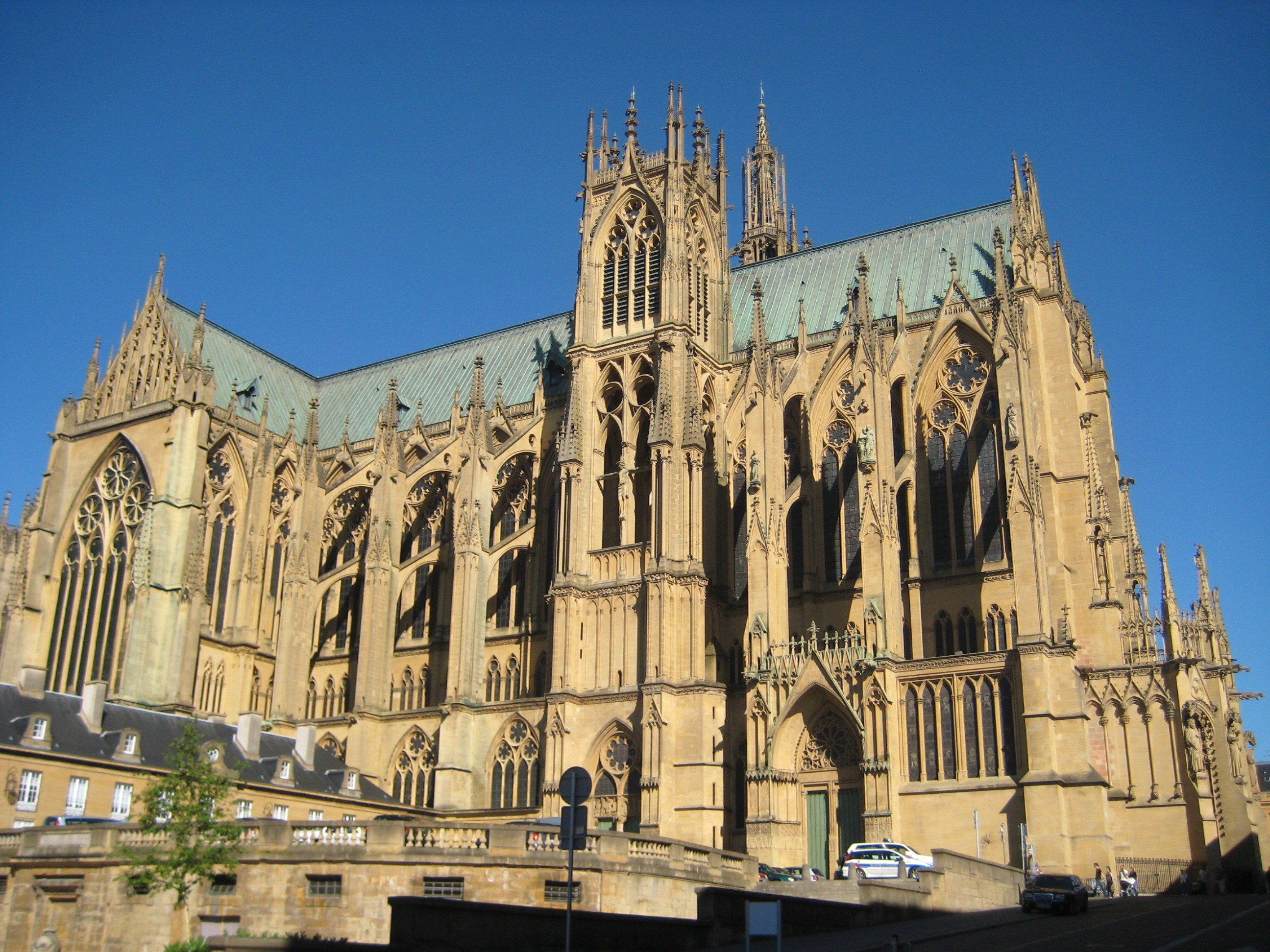 Description Cathédrale Saint Etienne de Metz Date22 May 2009Sourcemon appareil photoAuthorAimelaime Cathédrale Saint Etienne de Metz